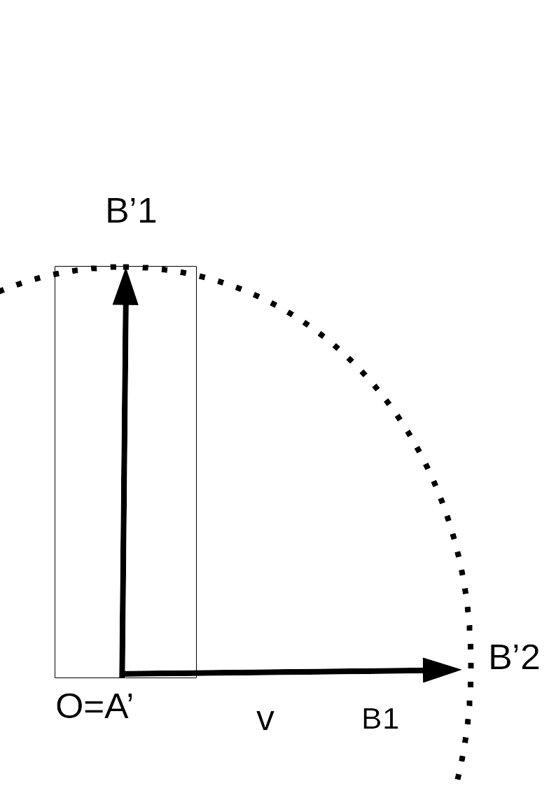 Double pendule à photon horizontzle et verticale immobile